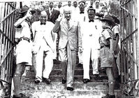 1951年，九龍總商會時任理事長謝伯昌與港督葛量洪（中）參觀傢俬展覽。